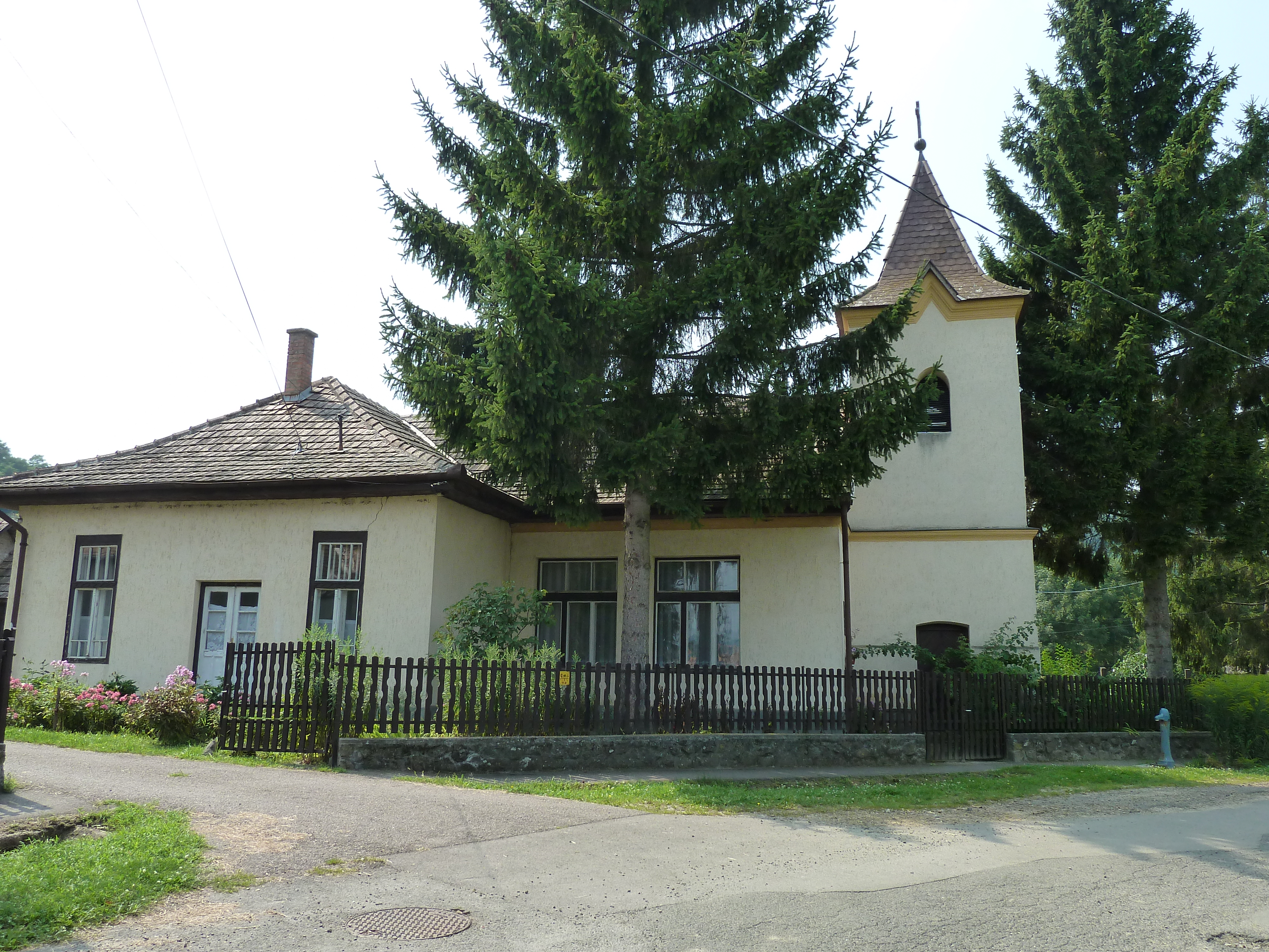 Evangélikus templom, Kutasó